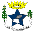 Brasão de armas de Witmarsum, Santa Catarina - Brasil